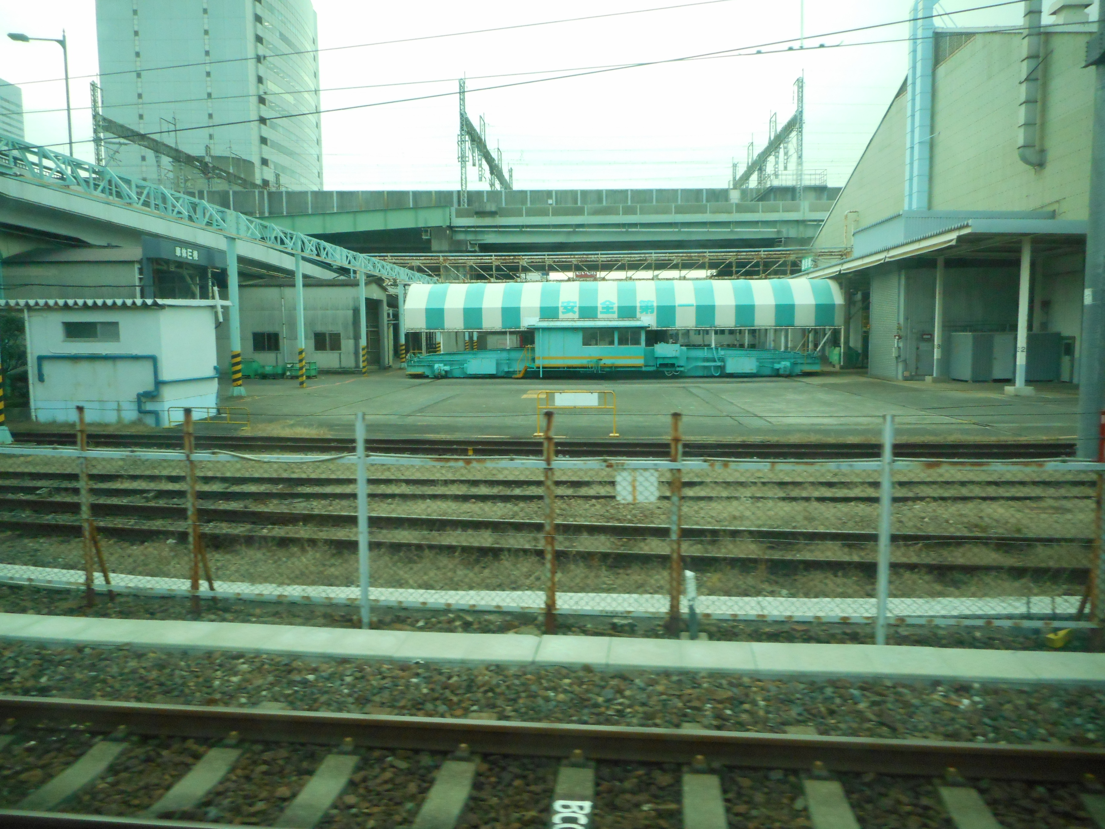 大宮総合車両センター設備：車体E棟北側入口－高崎線 大宮－宮原間列車内より進行方向左側車窓を撮影